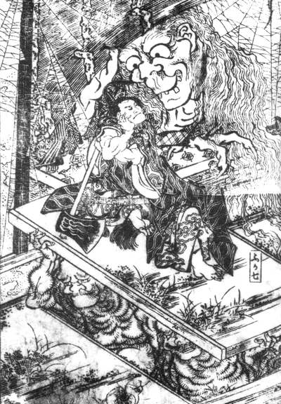 Ōnmyo Imoseyama (阥阦妹背山)